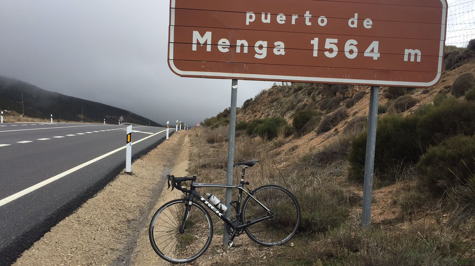 Puerto de Menga en la Paramera de Ávila, España